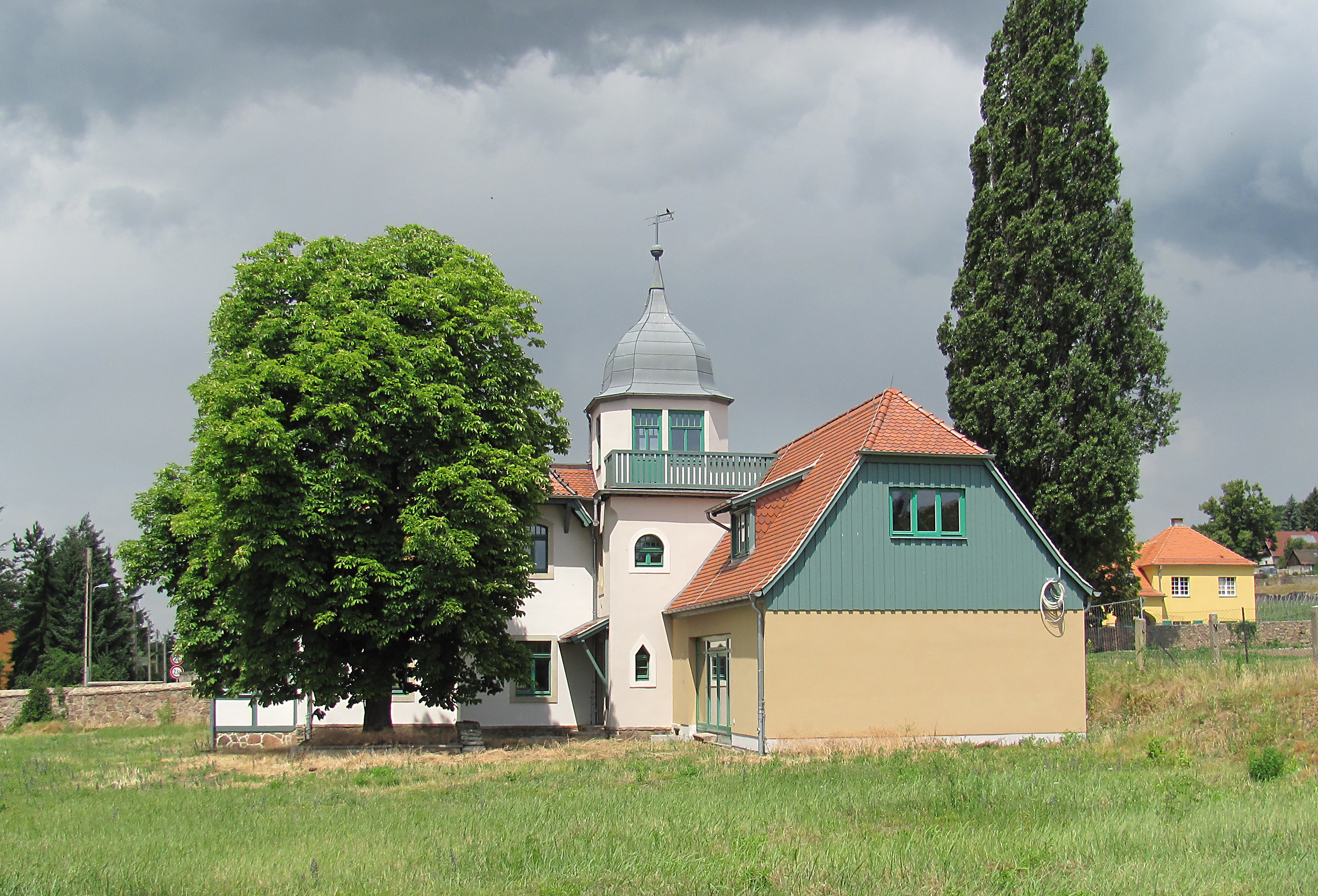 Radebeul, Landhaus Perle von Osten, rechts im Hintergrund der Paulsberg (Lößnitz)